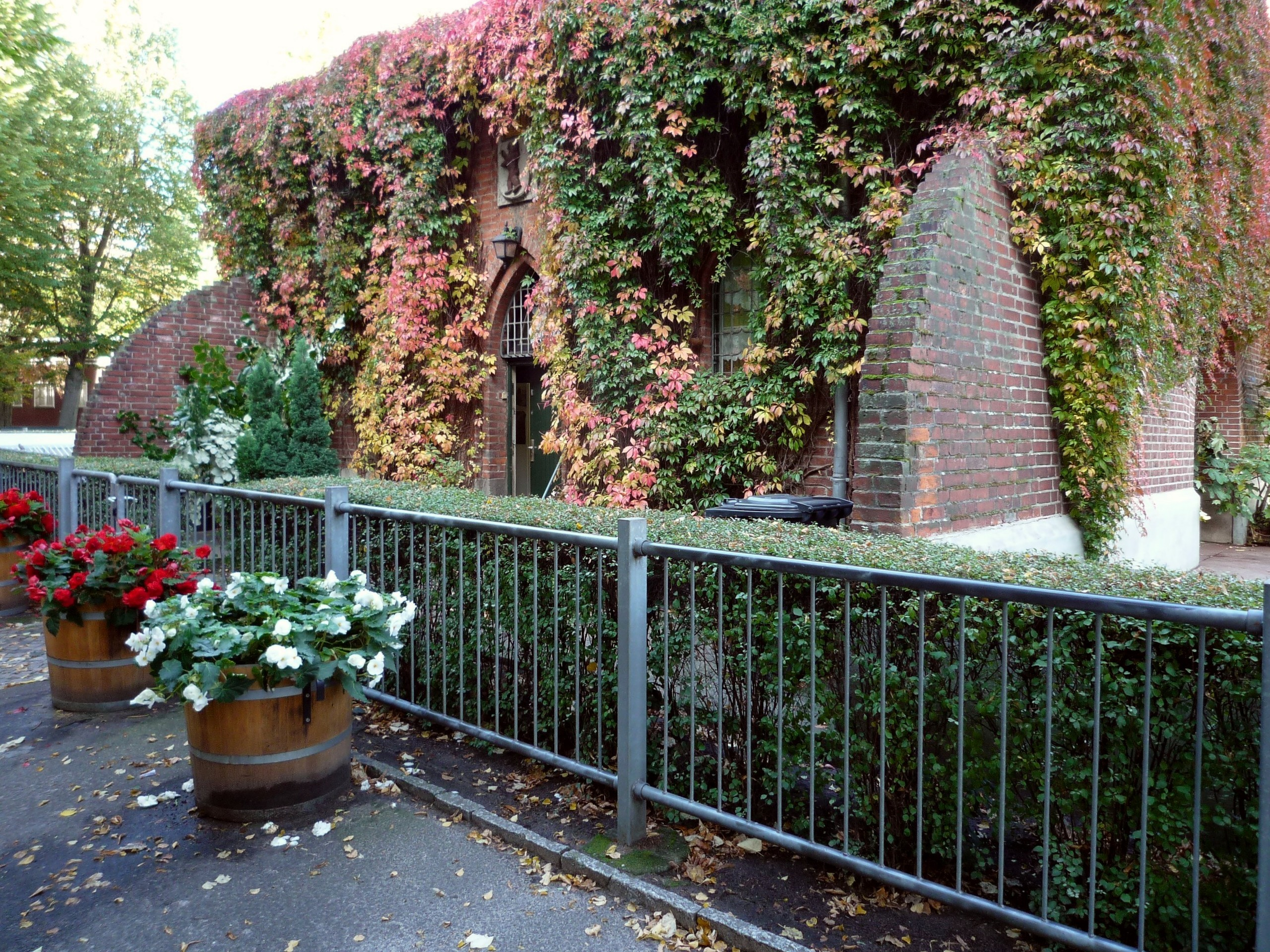 Berlin, Stadtbezirk Mitte. Das Gebäude des Bärenzwingers im Köllnischen Park.